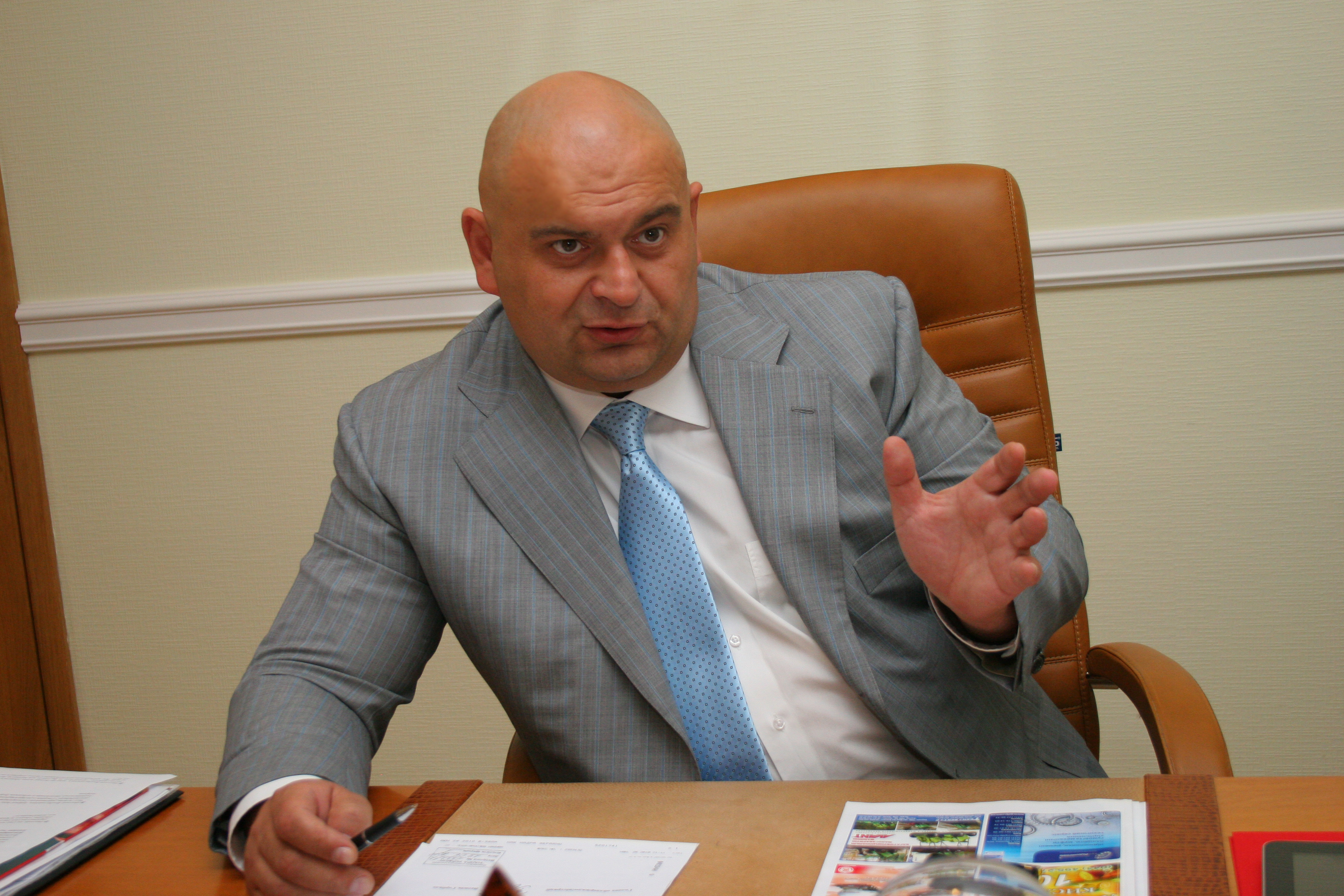 Микола Злочевський